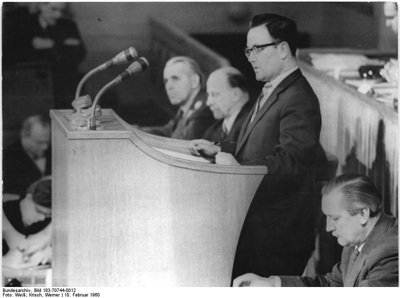 Zentralbild Weiß-Krisch 10.2.1960 Bedeutsame Volkskammer-Sitzung am 10.2.1960 Der Präsident der Volkskammer, Dr. Johannes Dieckmann, eröffnete die mit Spannung erwartete 10. Sitzung der Obersten Volksvertretung der DDR. Auf der Tagesordnung stehen eine bedeutsame Regierungserklärung, die von Ministerpräsident Otto Grotewohl abgegeben wird, sowie die Verabschiedung des Gesetzes über den Vertrag vom 8. Oktober 1959 über Handel und Seeschiffahrt zwischen der DDR und der Volksrepublik Albanien und die Wahl des Generalstaatsanwalts der DDR. UBz: Abgeordneter Wolfgang Heyl (CDU) spricht zur Diskussion.